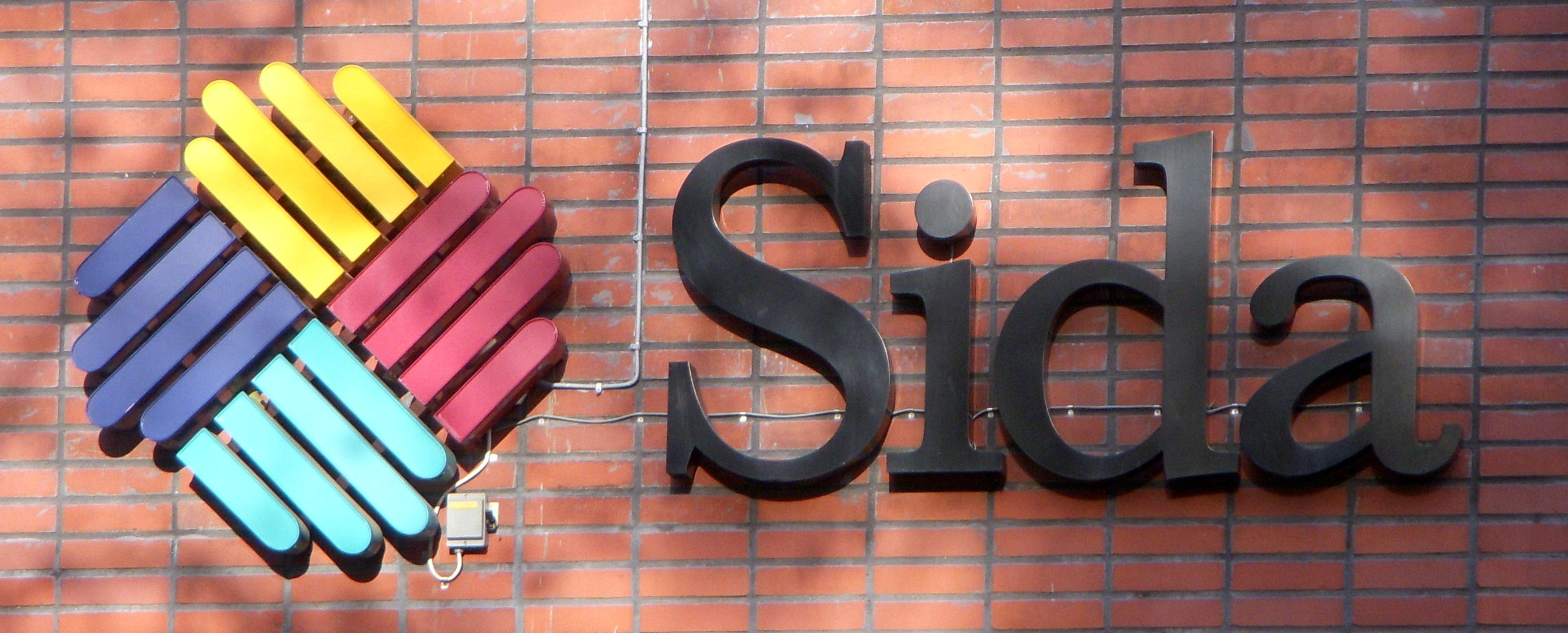 Sida skylt